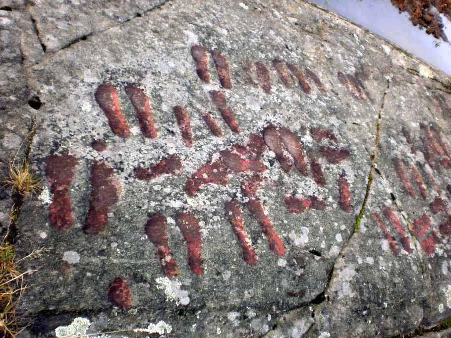 "Dansskolan i Godegården", Fåglum 2010, hällristning